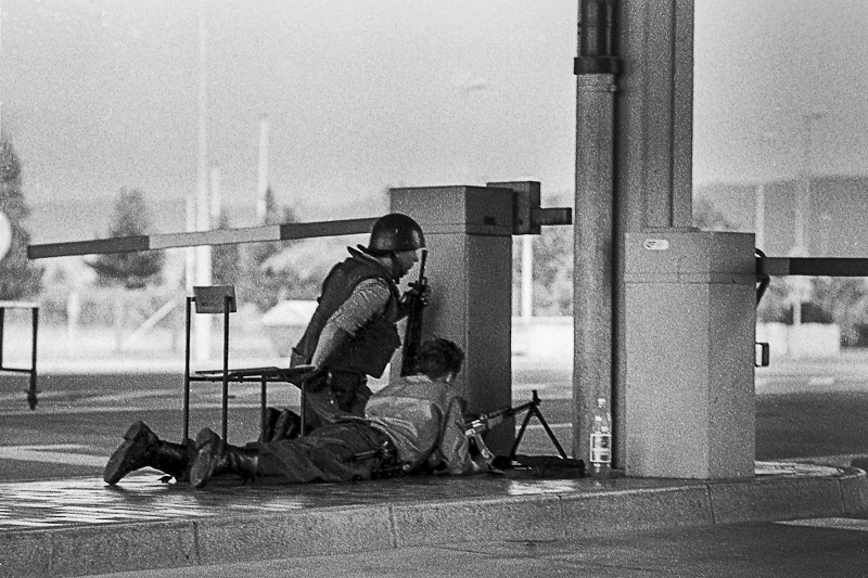 Dogajanje na mejnem prehodu Vrtojba med slovensko osamosvojitveno vojno, dne 26.06.1991, ob prihodu tankovske kolone JLA. Miličnika stražita prehod.